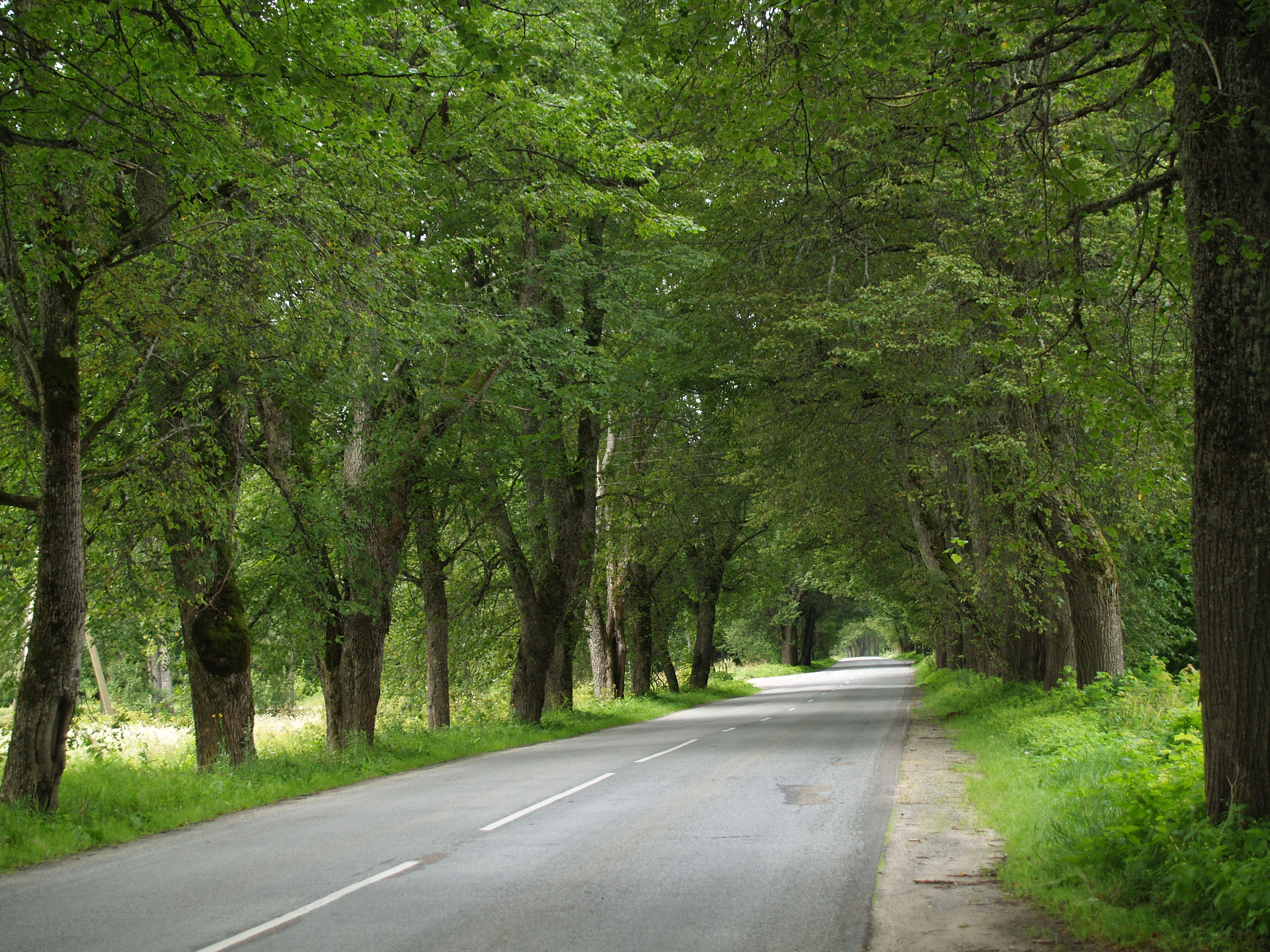 Ungurpilsi allee